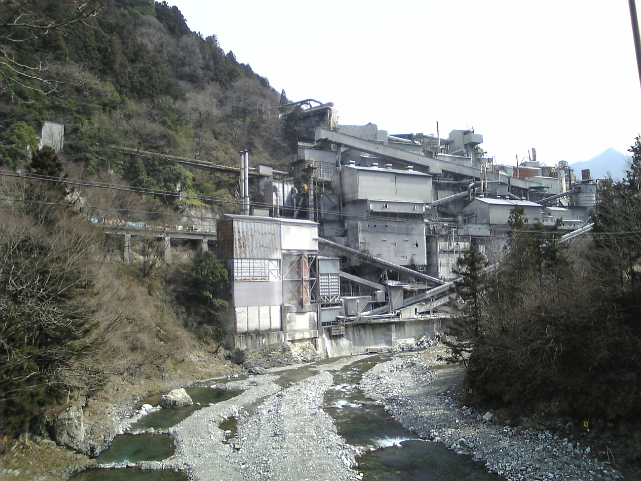 奥多摩工業・氷川事業所